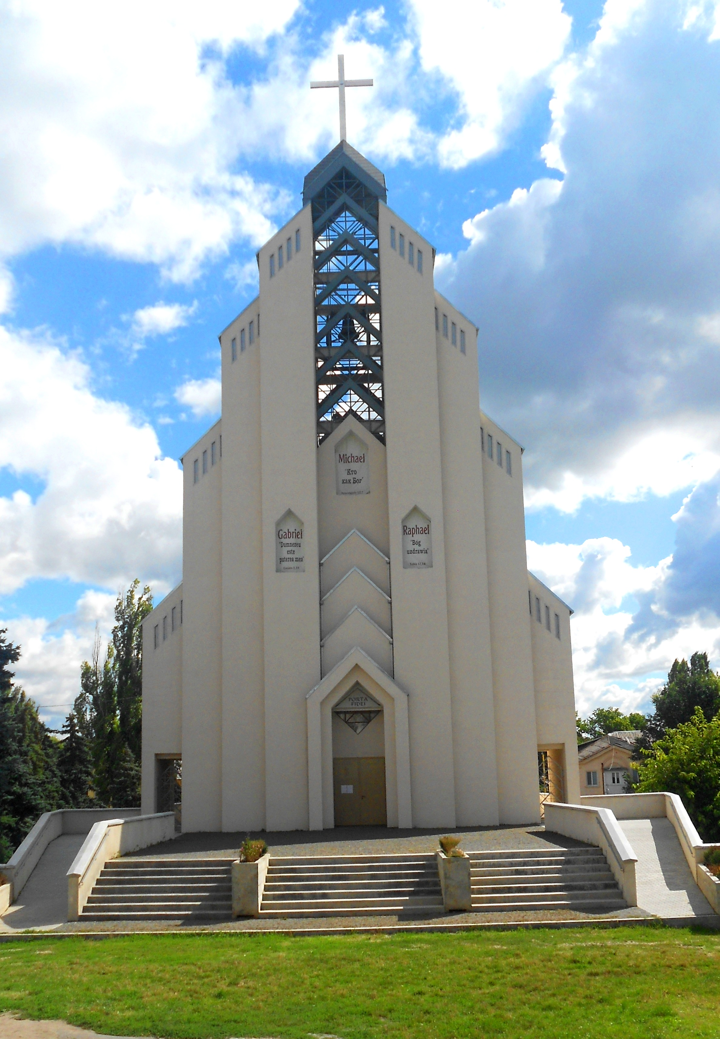 Biserica Romano-Catolică din Bălți